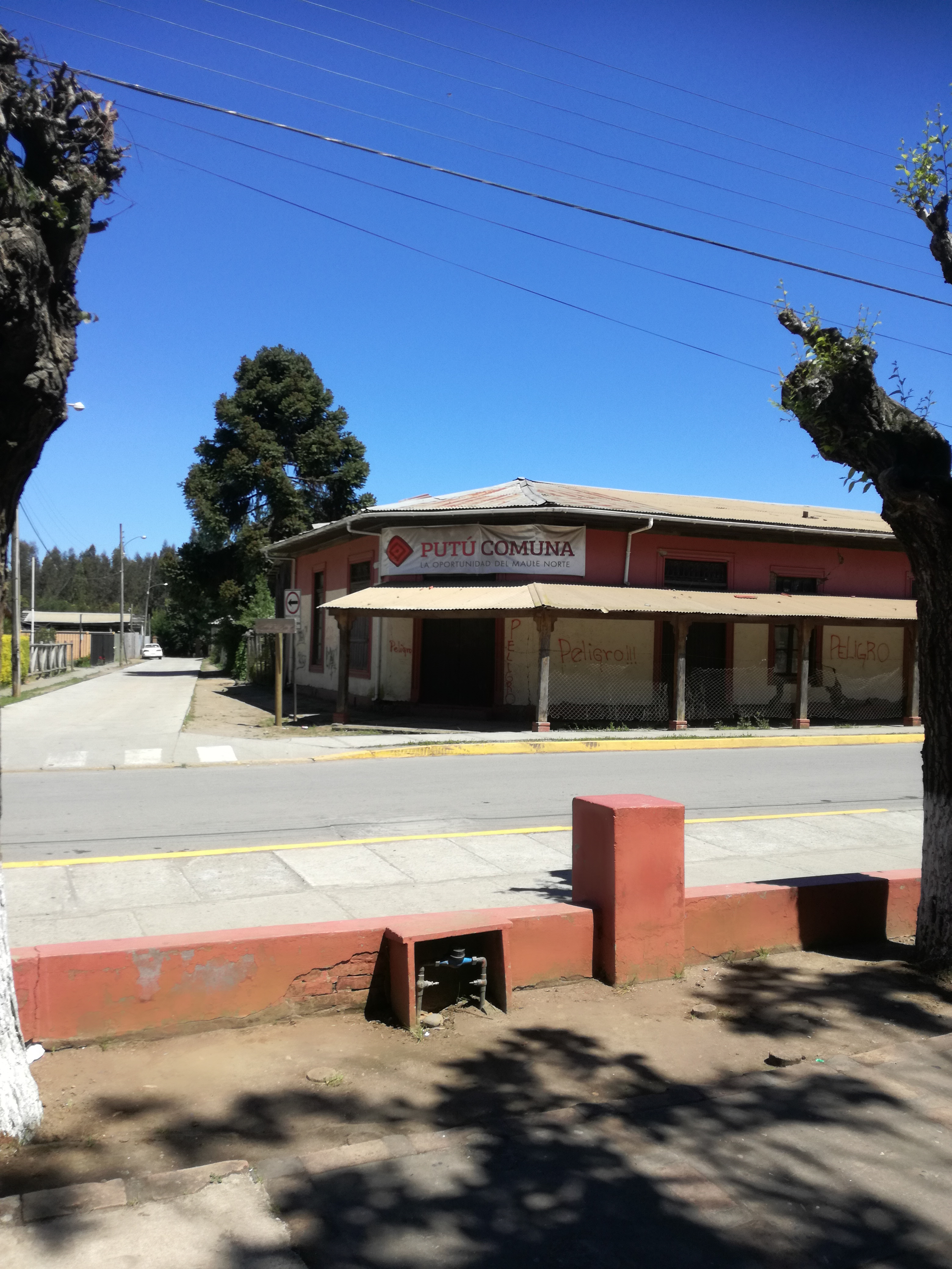 Casa ubicada frente a la plaza del pueblo de Putú, en Constitución (Chile). Nótese el letrero "Putú comuna", que es una demanda local debido a la lejanía de la cabecera comunal.